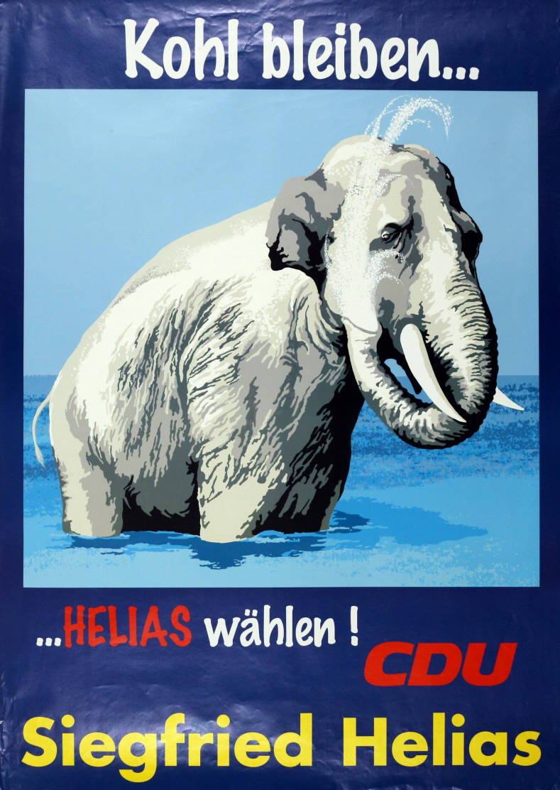 Kohl bleiben ... ... Helias wählen! CDU Siegfried Helias Abbildung: Elefant (Graphik) Plakatart: Kandidaten/Personenplakat ohne Objekt-Signatur: 10-001: 5053 Bestand: Plakate zu Bundestagswahlen (10-001) GliederungBestand10-18: Plakate zu Bundestagswahlen (10-001) » Die 14. Bundestagswahl am 27. September 1998 » CDU » Ohne Porträtfoto Lizenz: KAS/ACDP 10-001: 5053 CC-BY-SA 3.0 DE